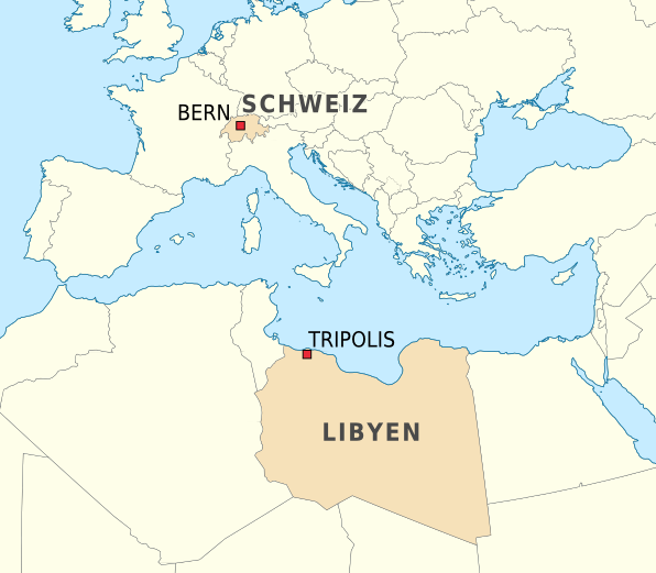 Karte Libyen und Schweiz